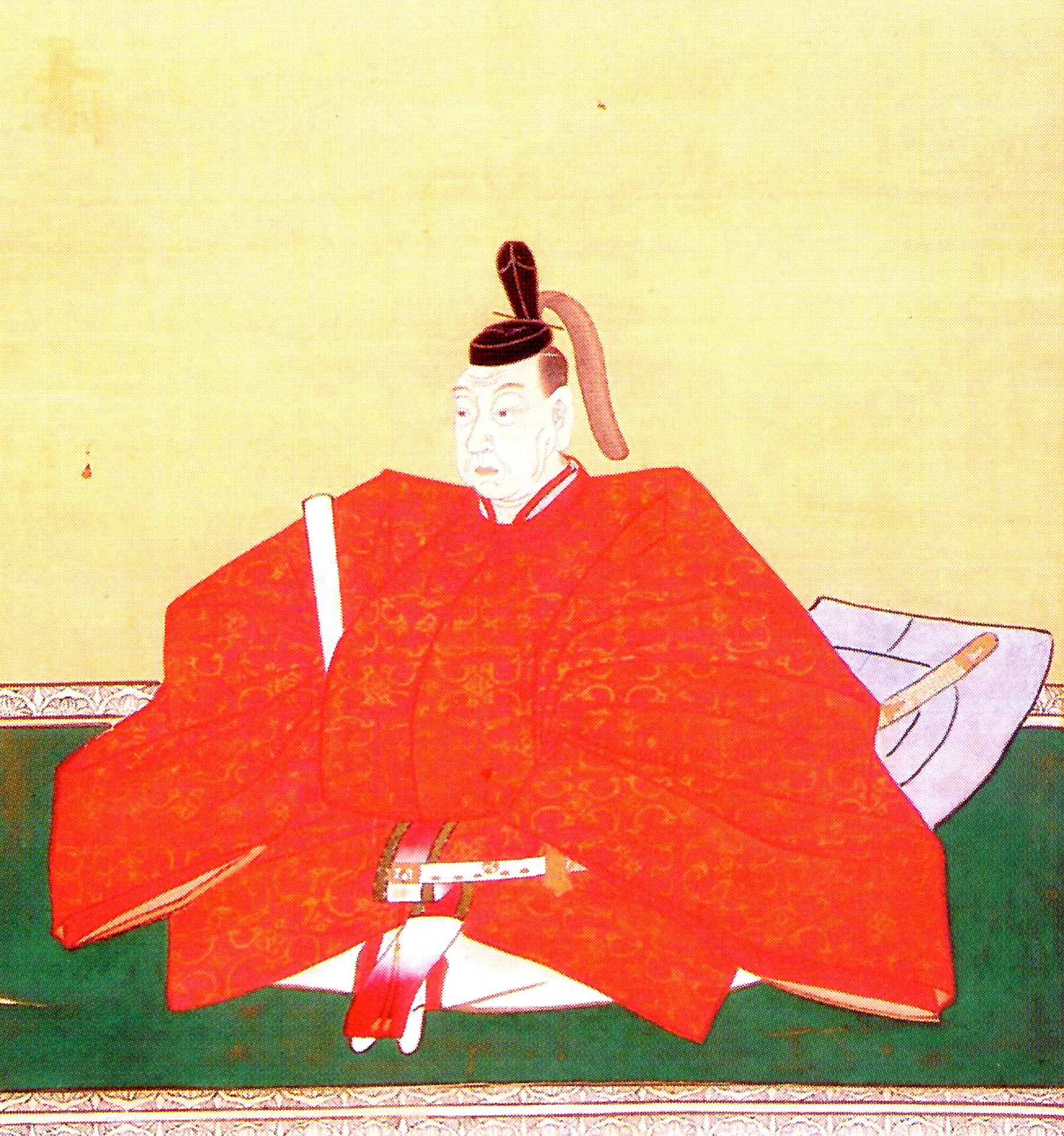 岡部長住の肖像。